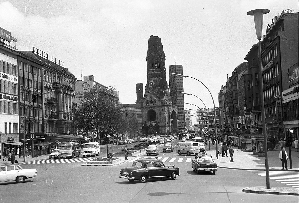 Kurfürstendamm ab Kreuzung Joachimsthaler Straße in Berlin-Charlottenburg.